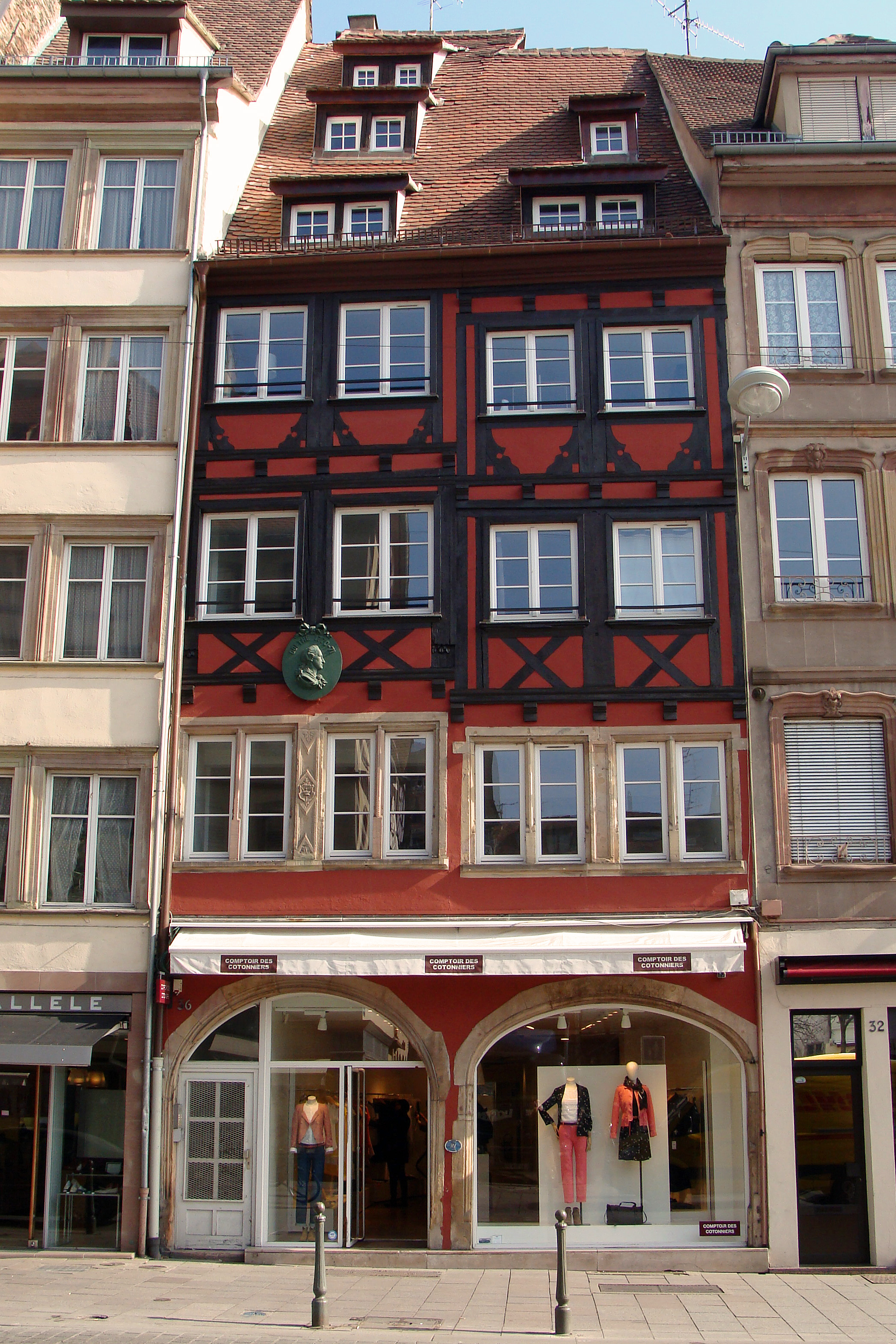 Maison de Goethe à Strasbourg. Goethe y résida de 1770 à 1771 pendant ses études. Une plaque est placée sur la maison.